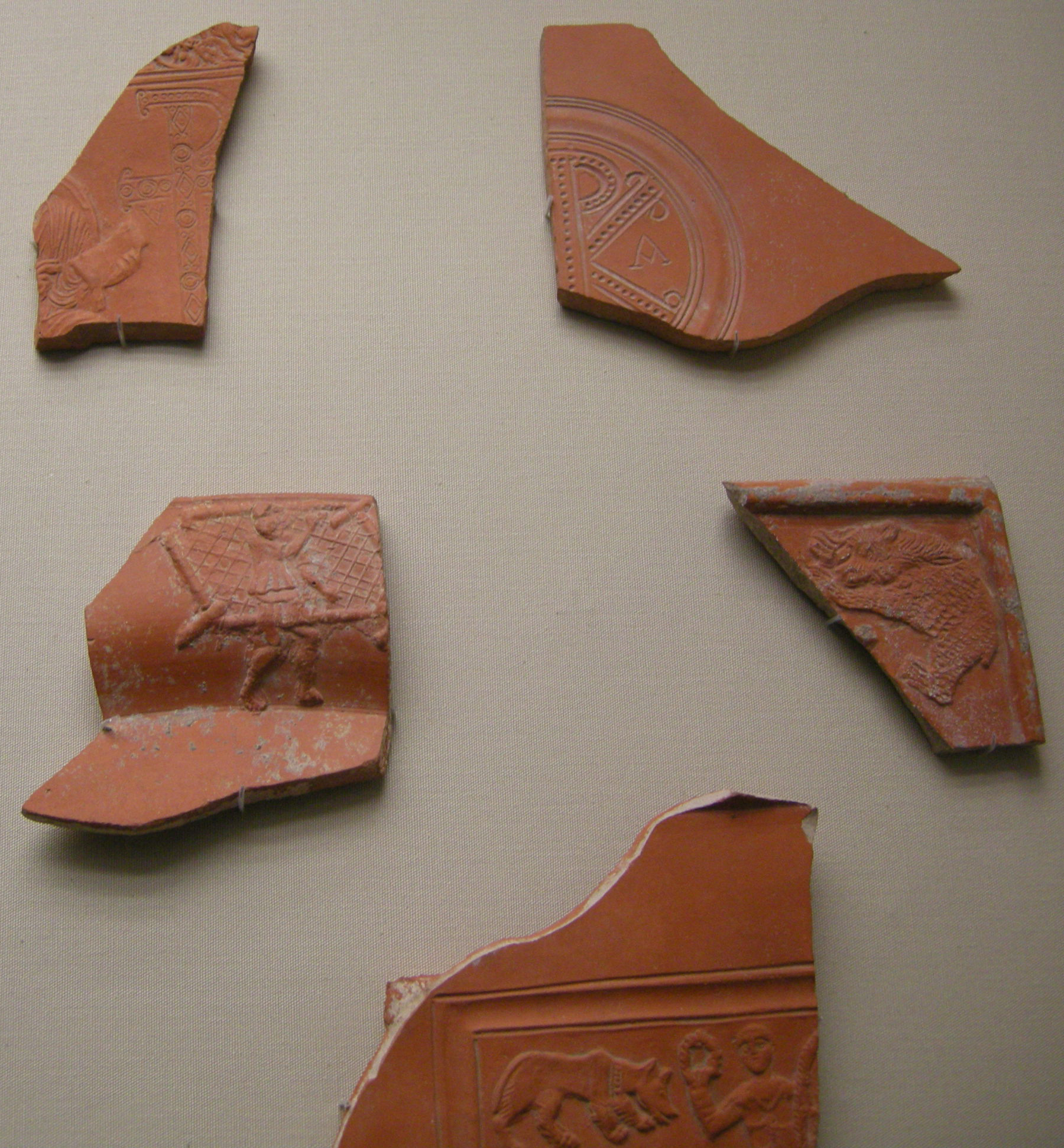 Frammenti di ceramica sigillata africana, da tunisi, 360-420 dc